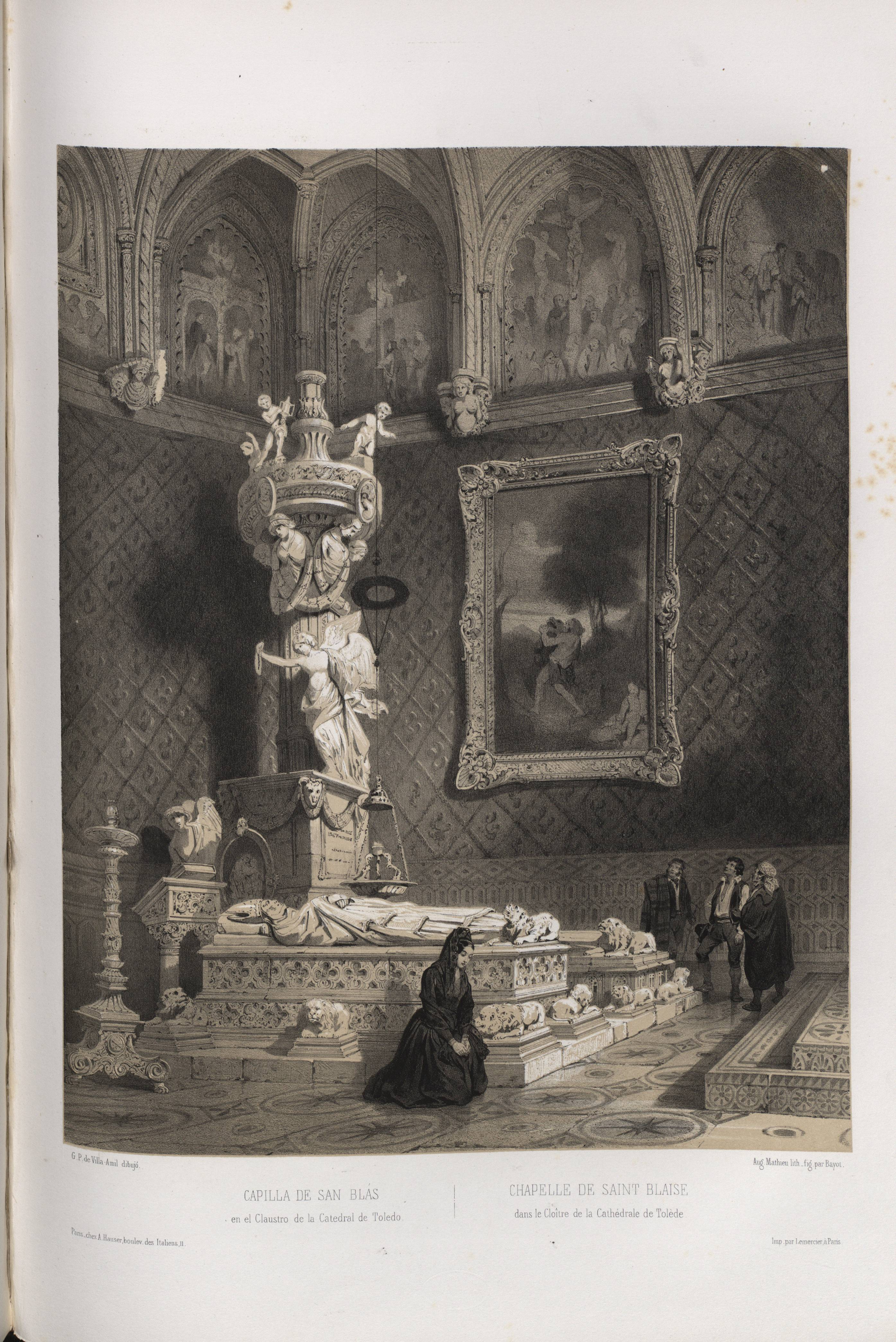 Capilla de San Blas en el claustro de la catedral de Toledo.